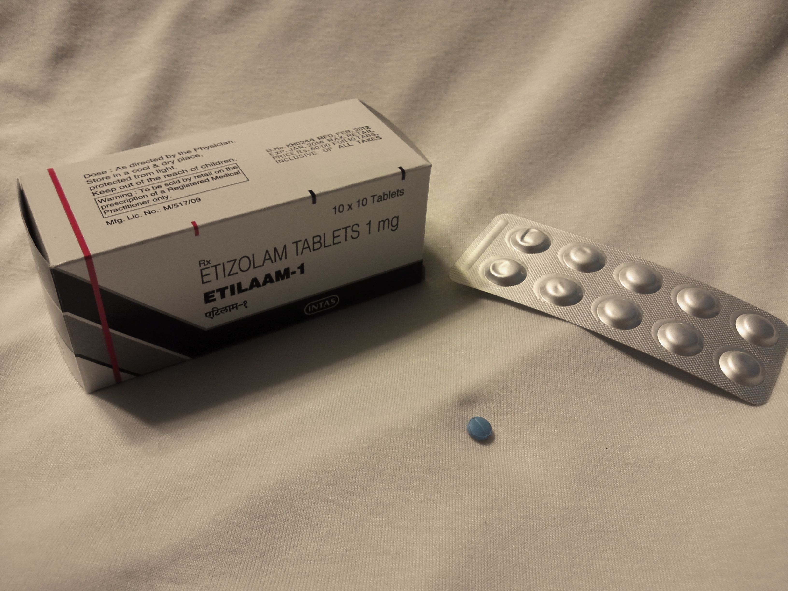 印Intas Pharmaceuticals社より販売されているEtilaam (エチゾラム) 1mg錠のパッケージ、シートおよび錠剤。